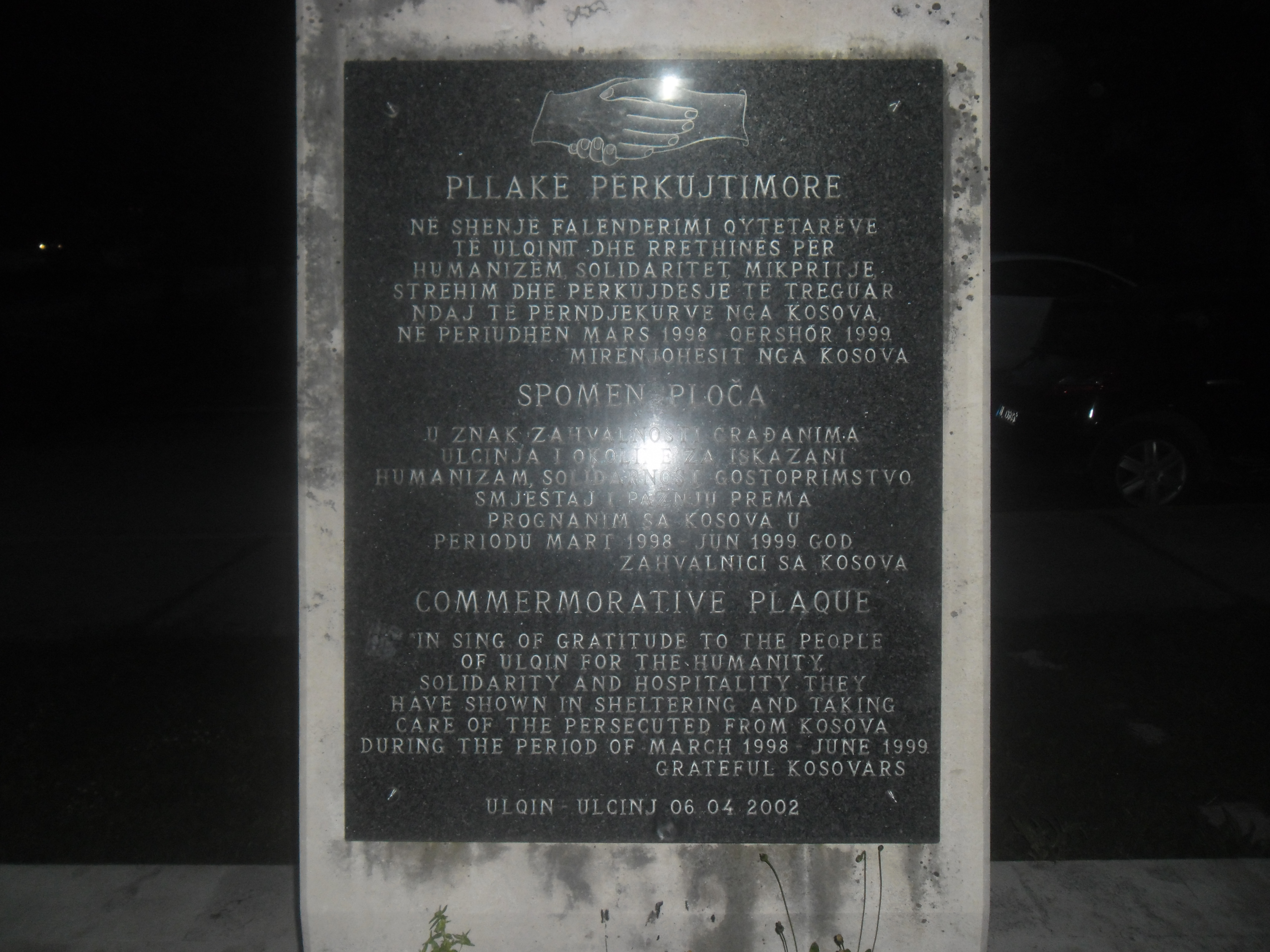 Ulcinj